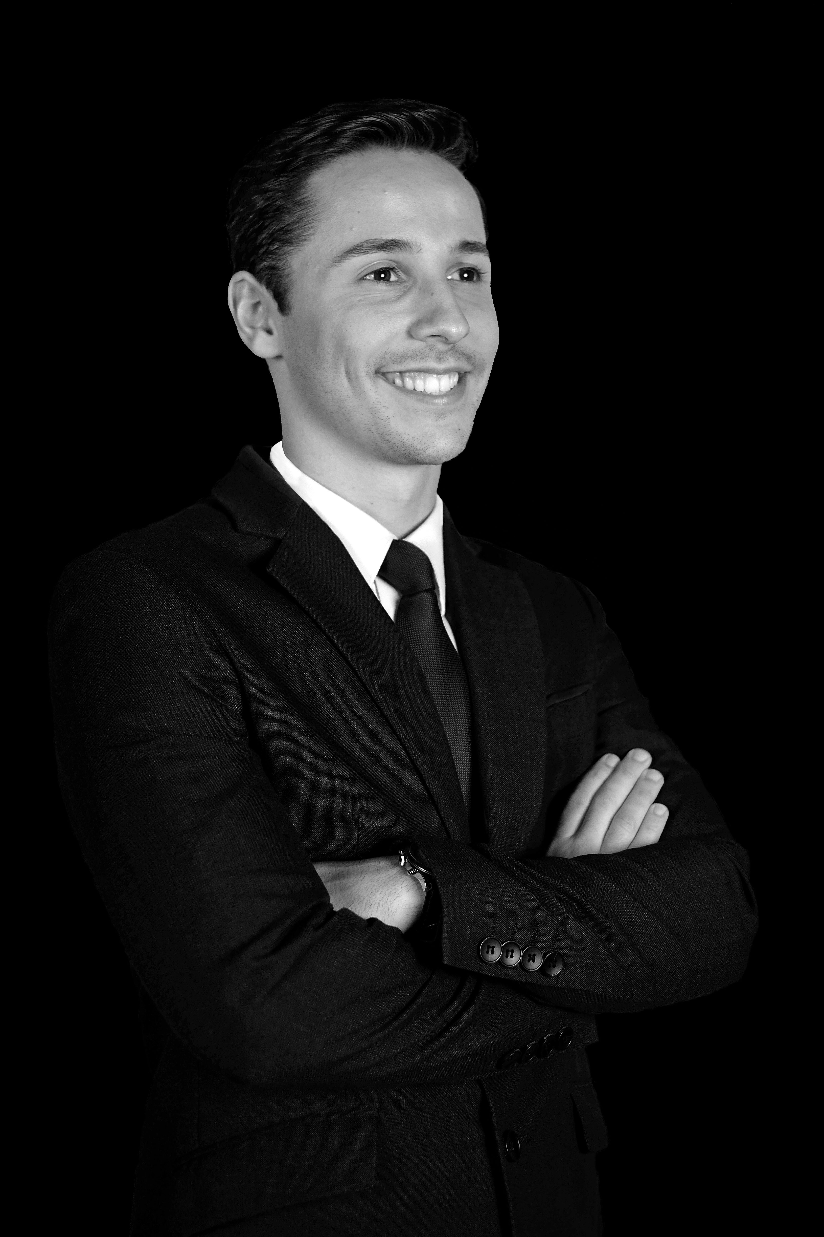 Diogo barbosa de melo autor a finta de uma vida